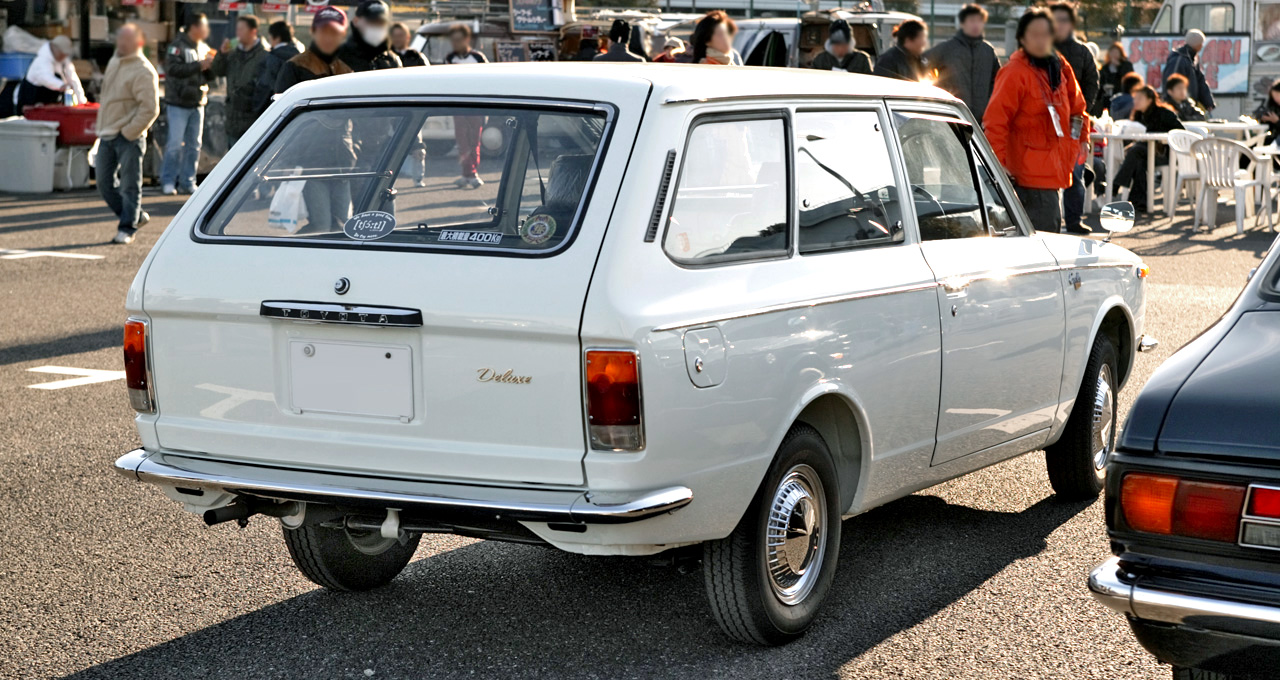 Toyota Corolla 2 door Van 1200 Deluxe ( KE18V-D )